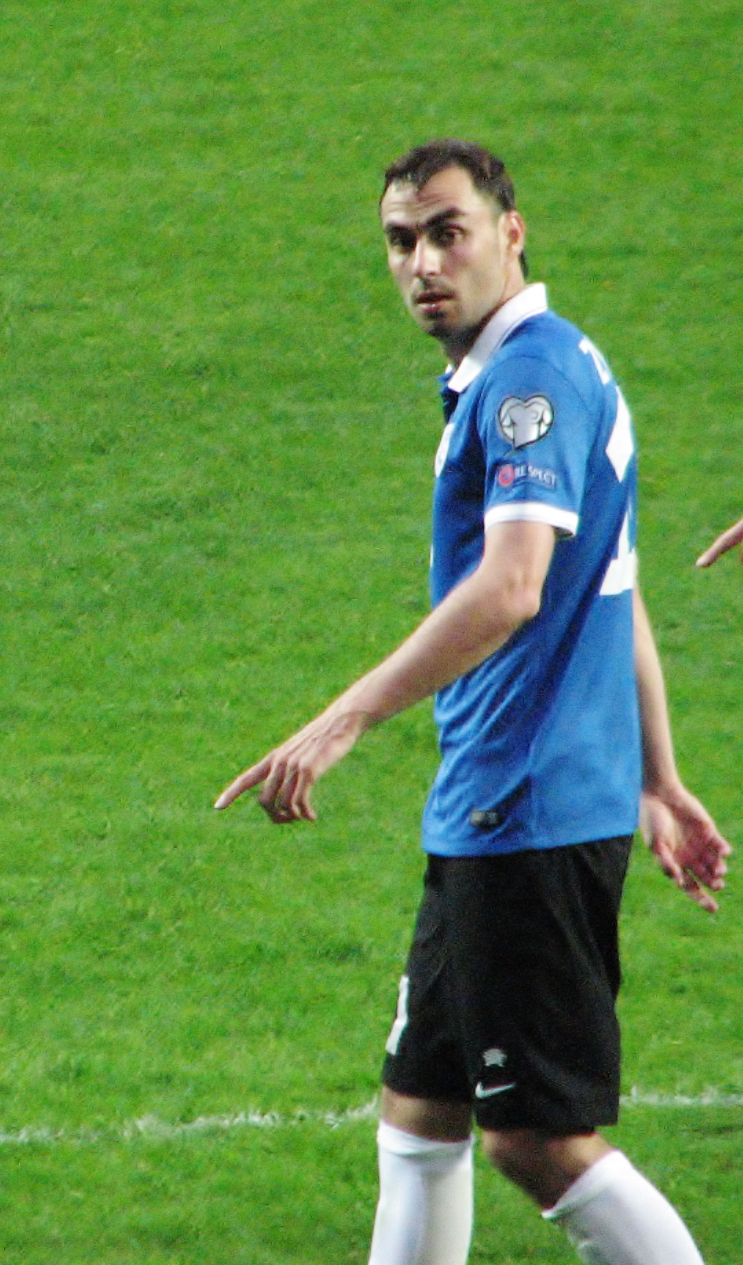 Sergei Zenjov Eesti - San Marino mängus